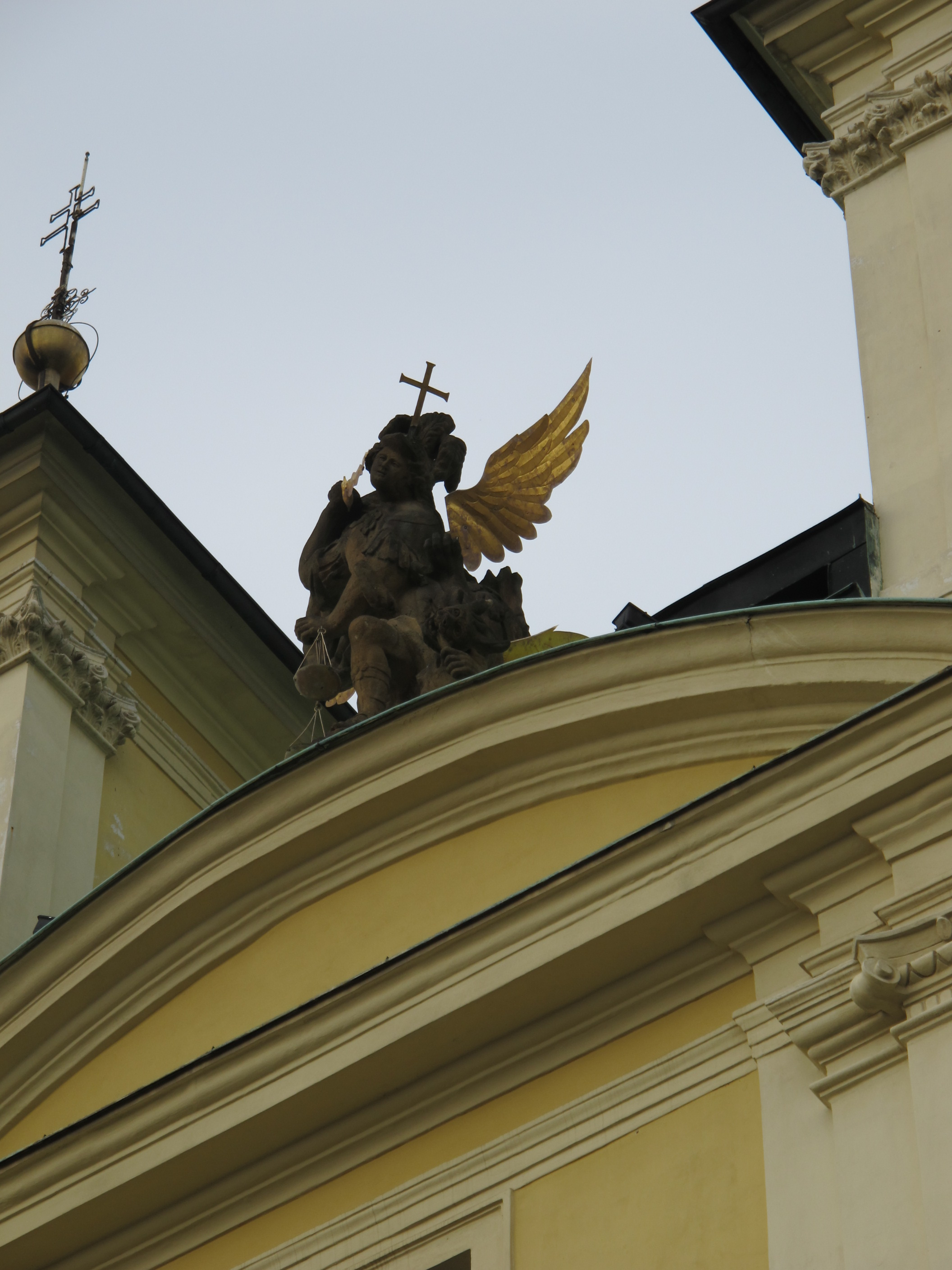 Kostel sv. Michaela archanděla, Masarykovo náměstí, Litvínov